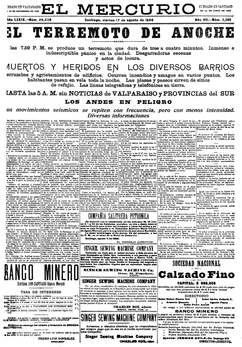 Ejemplar del diario El Mercurio de Santiago, año 1906.